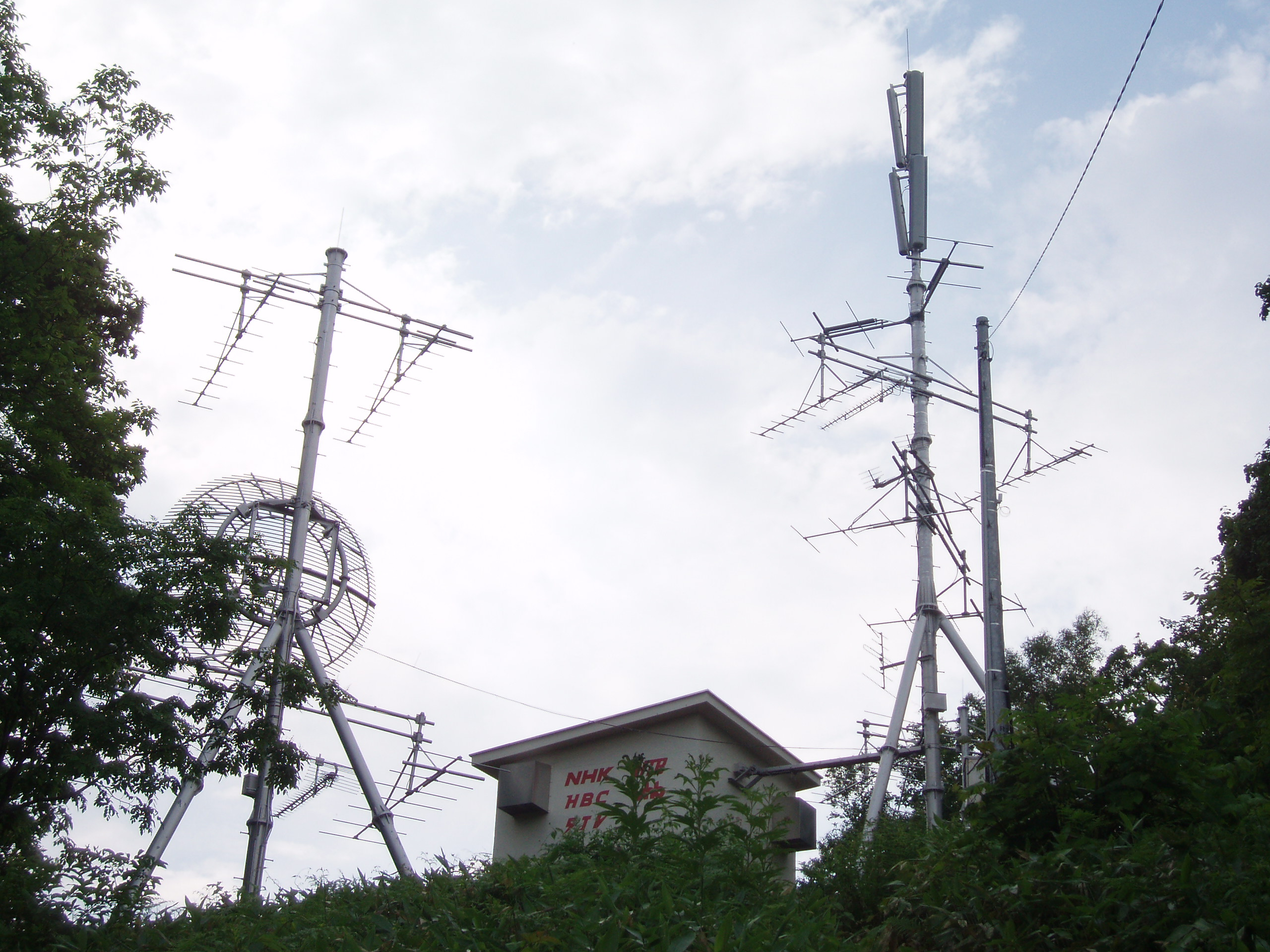 日高中継局 NHK・HBC・STV・HTB・UHB送信設備